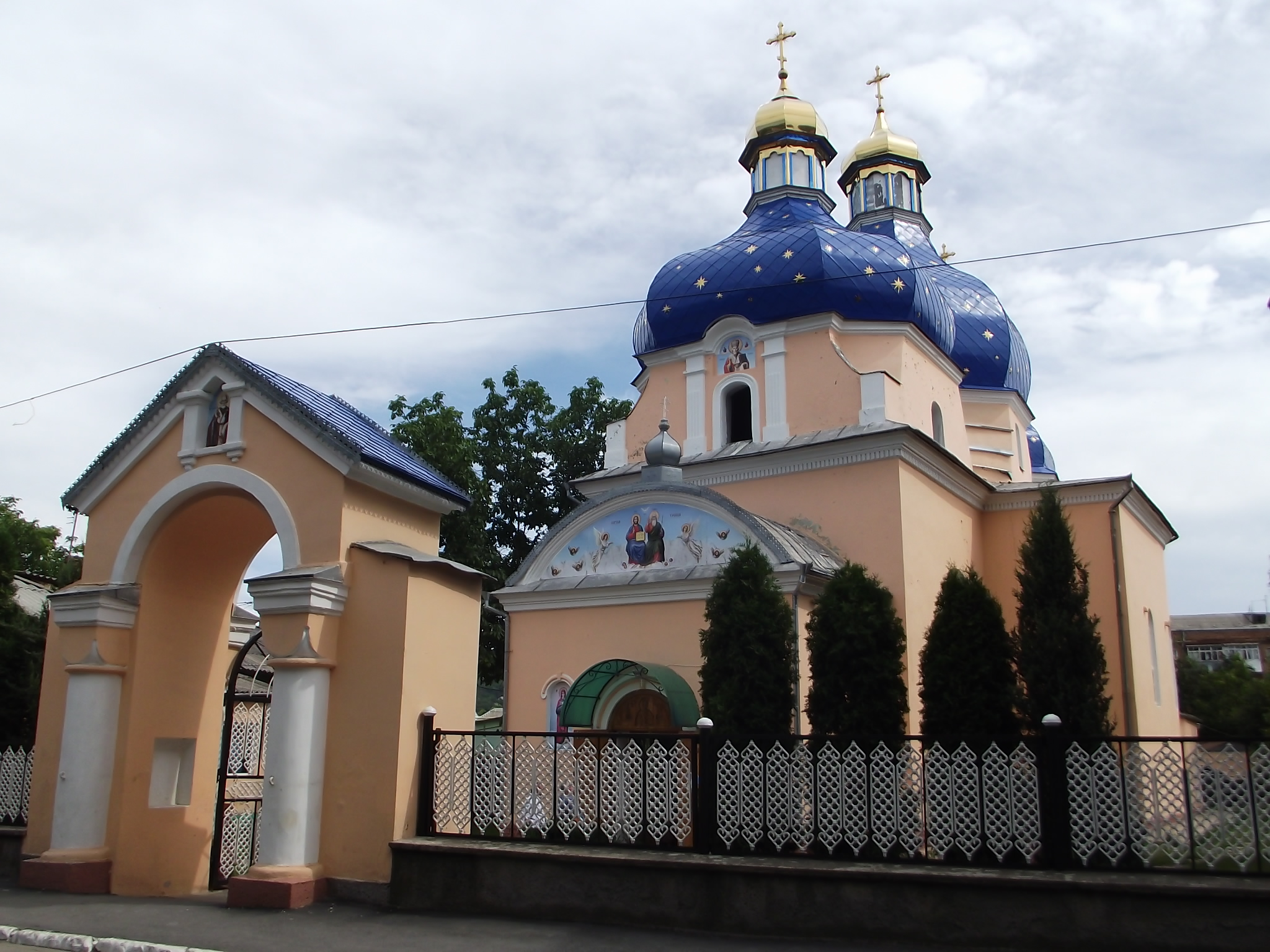 Миколаївська церква, Могилів-Подільський, пл. Соборна, площа,4